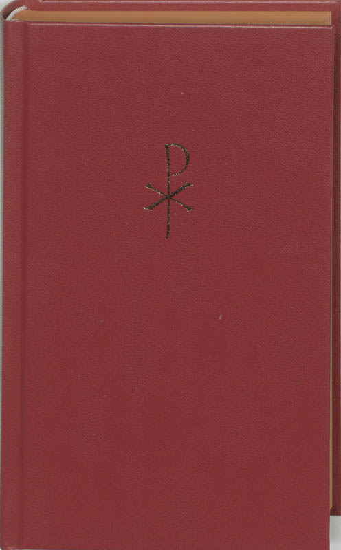 Omslag van het Liedboek voor de Kerken, 1973